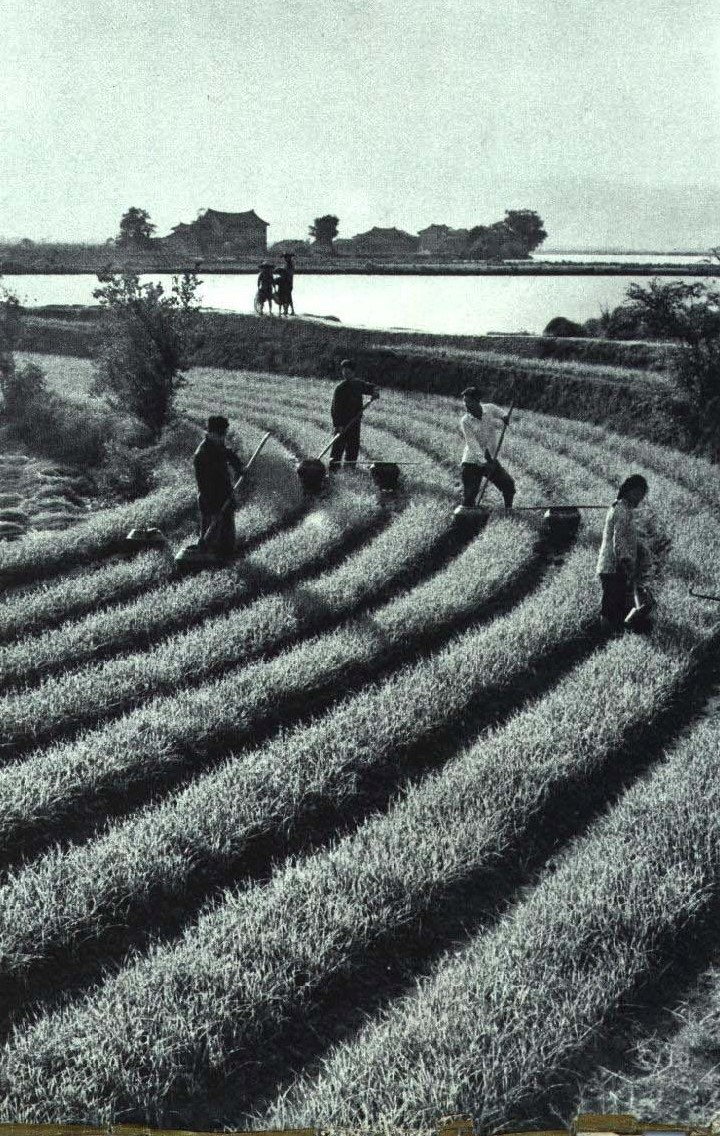 1964-06 1964年 福建莆田县麦田